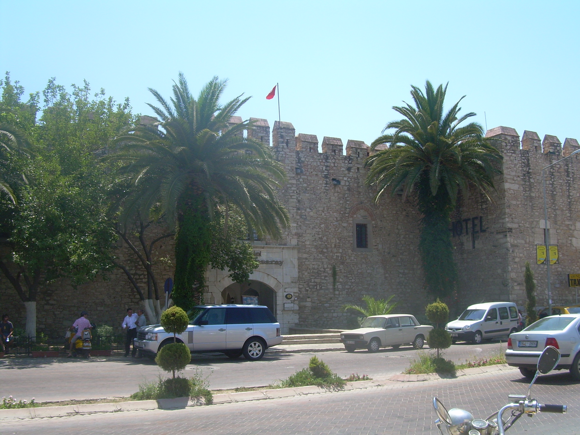 Kuşadası'nda bir kervansaray 1618.Şimdilerde bir ötel olarak kullanılıyor